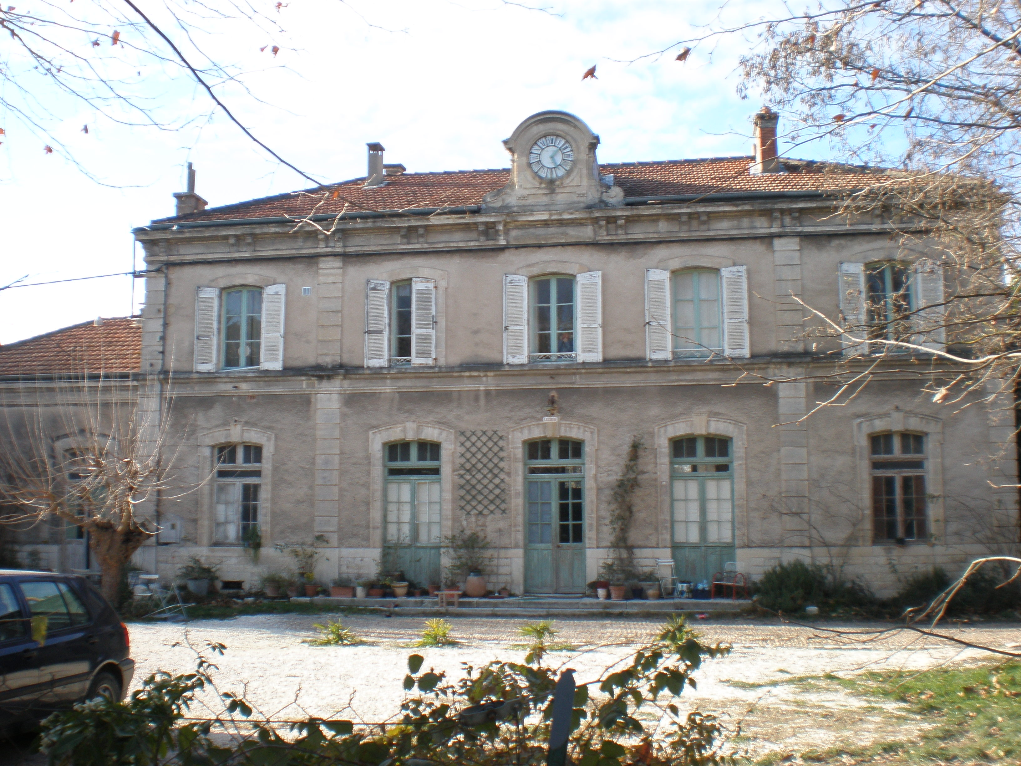 L'ancienne gare d'Uzès (Gard)